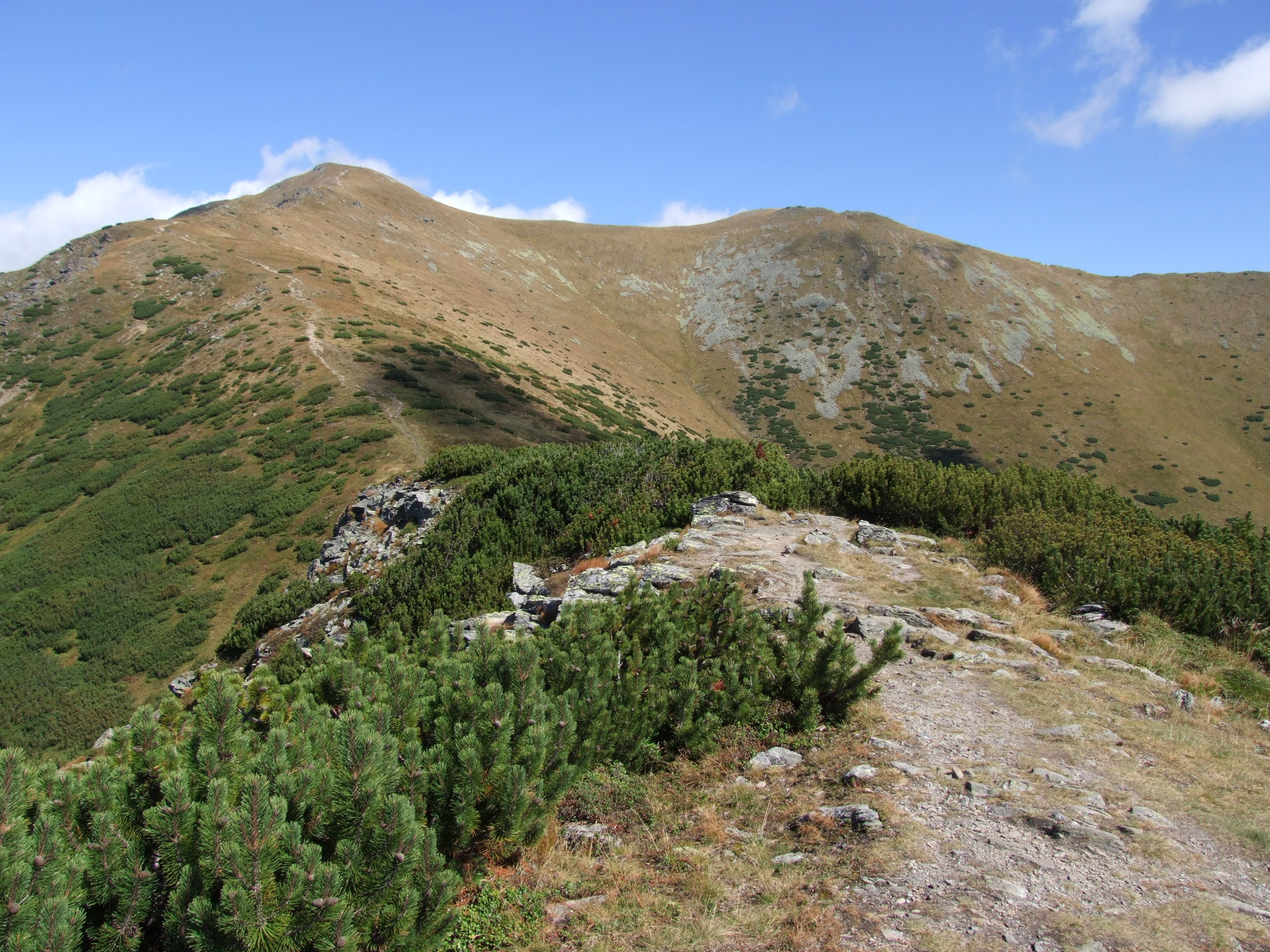 Widok z grani ółnocno-zachodniej (zielony szlak) na szczyt Barańca i Szerbawego